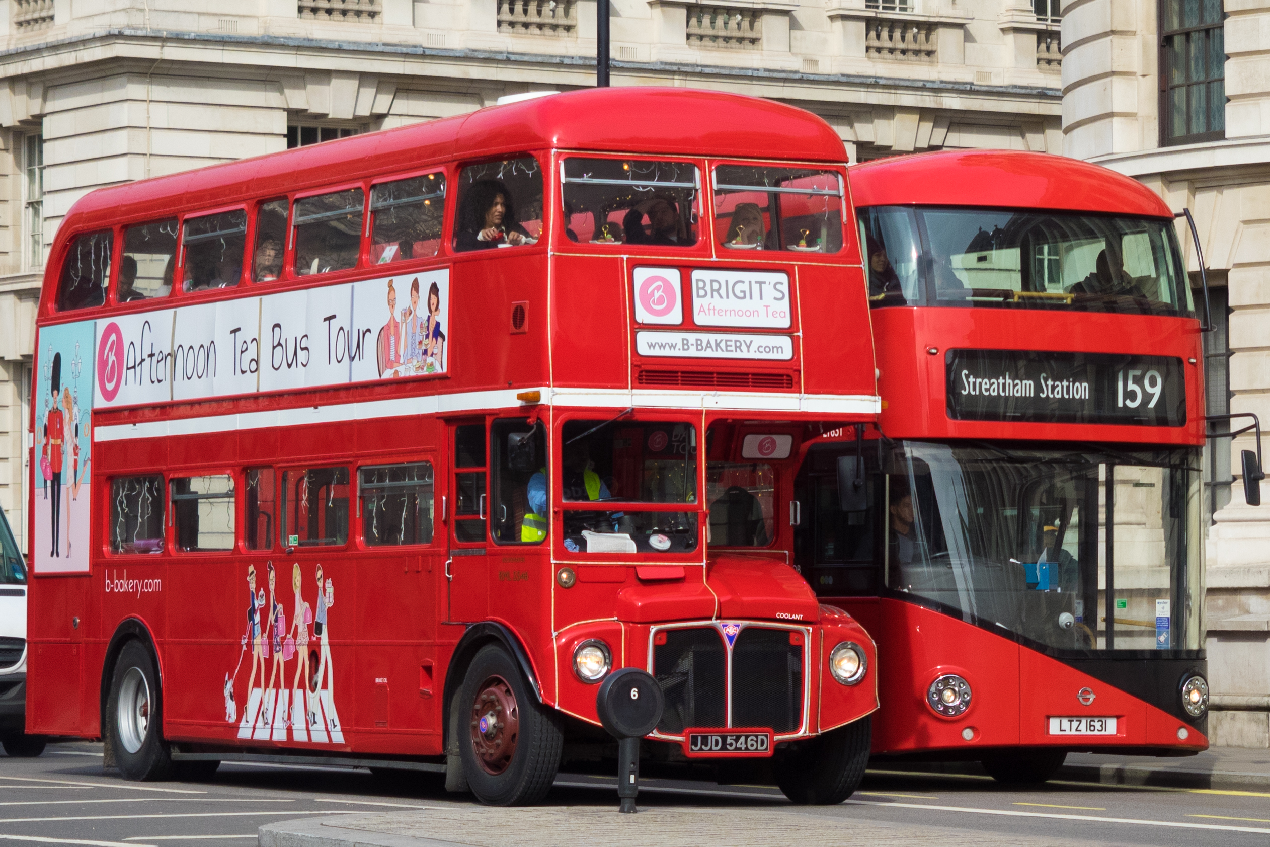 London